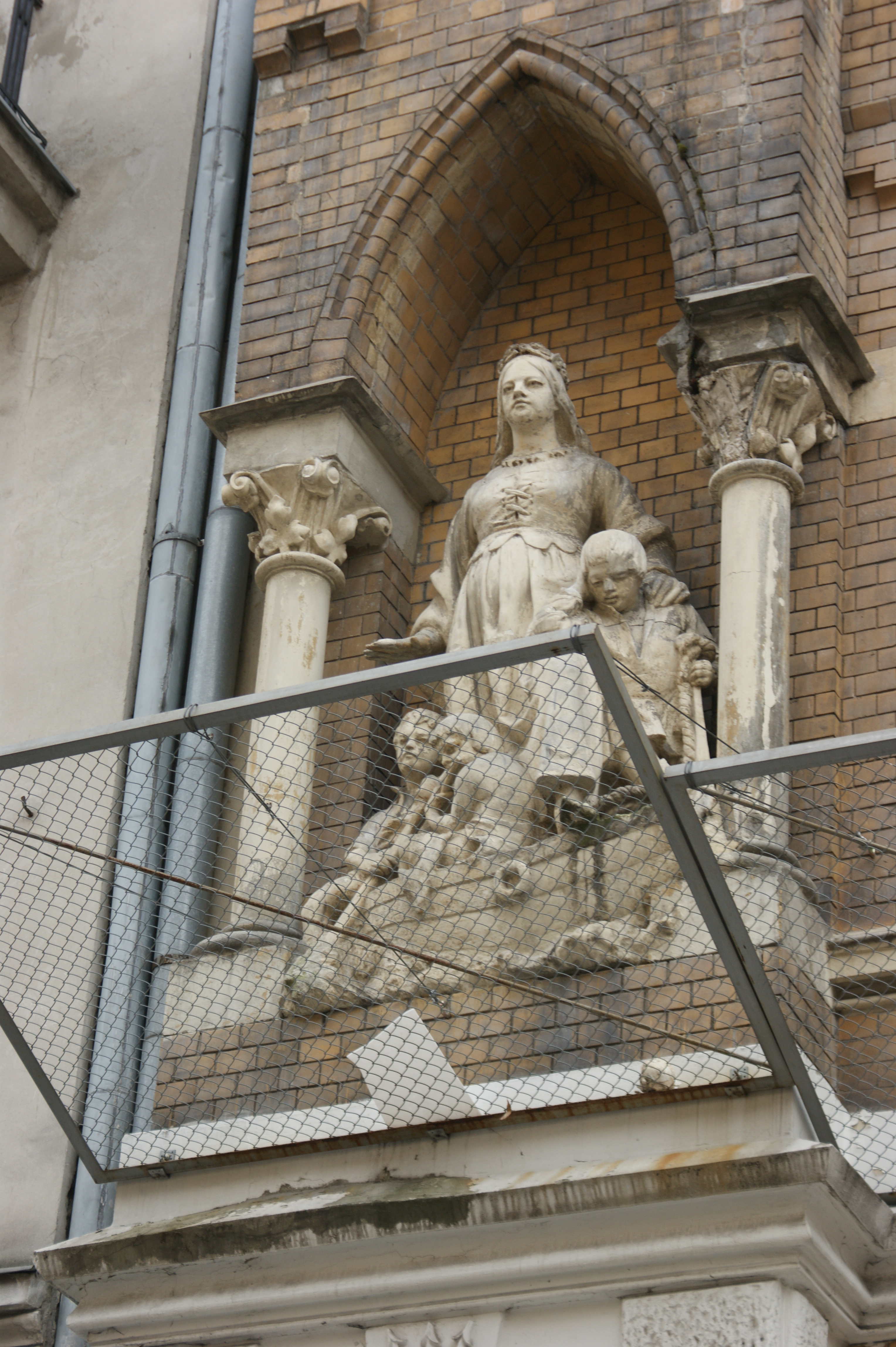 alegoria wisły